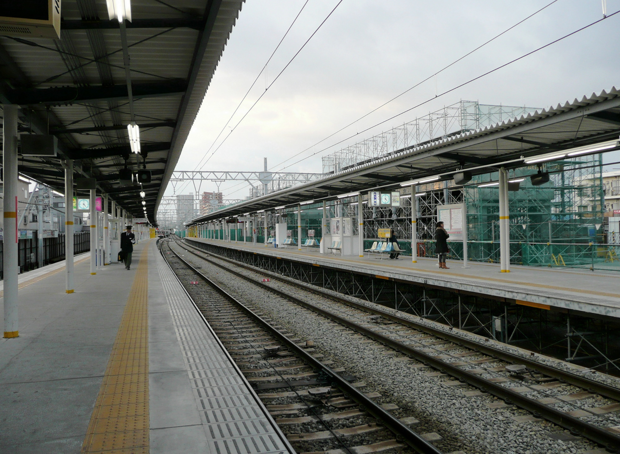 Kinki Nippon Railway,Nara Line,Higashi-Hanazono Station. /近鉄奈良線駅東花園駅ホーム。連続立体交差化工事中の仮設ホーム。